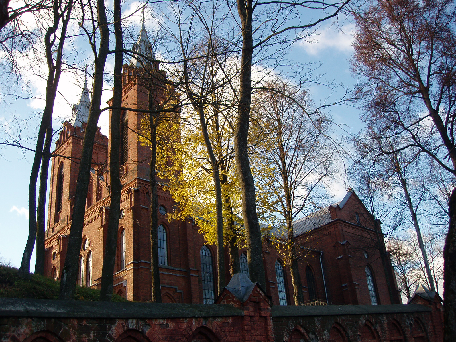 Žasliai church, Kaišiadorys district, Lithuania